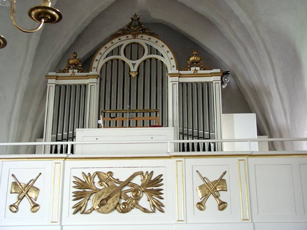 Drothems kyrka, orgeln. Foto: Xauxa 2003